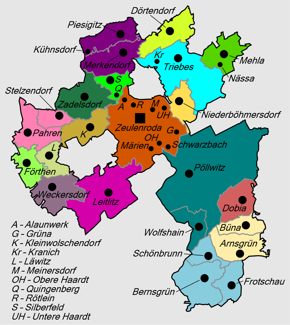 Gliederung der Stadt Zeulenroda-Triebes ab 1. Januar 1992